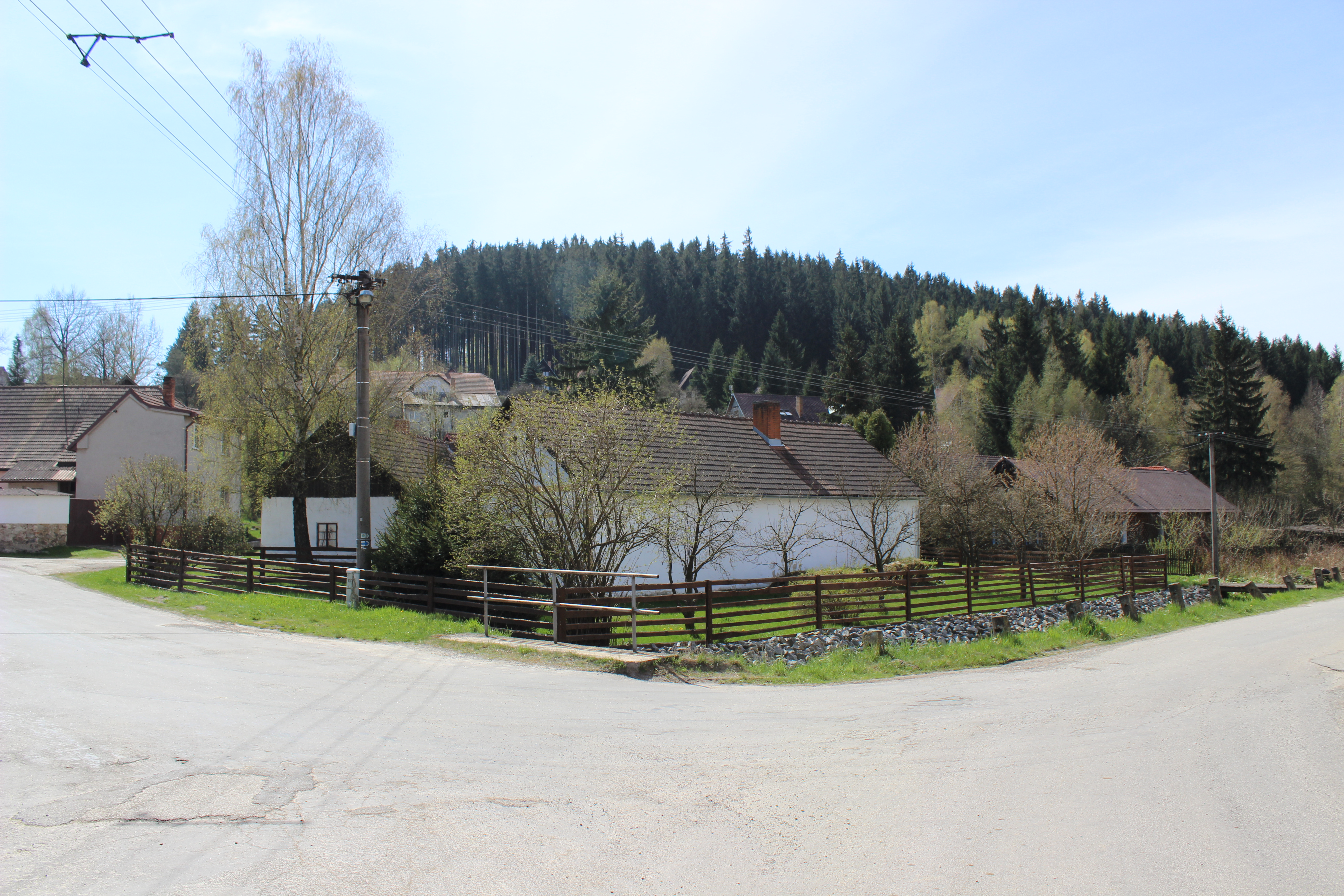 Zástavba v Lešově (pohled jihozápadním směrem). Project: Fotíme Česko.